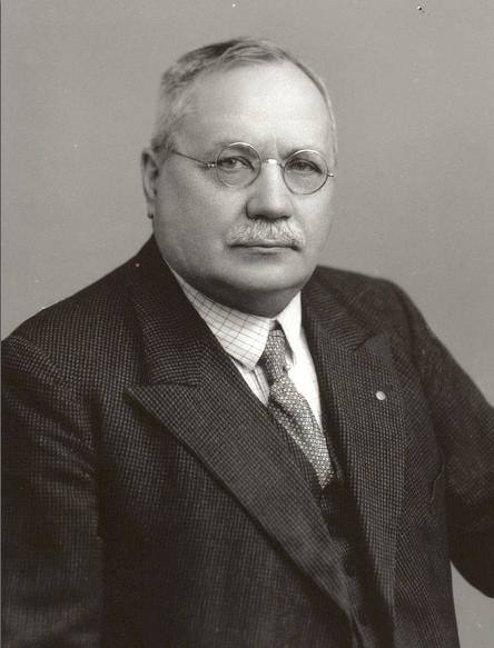 J Fred Olson